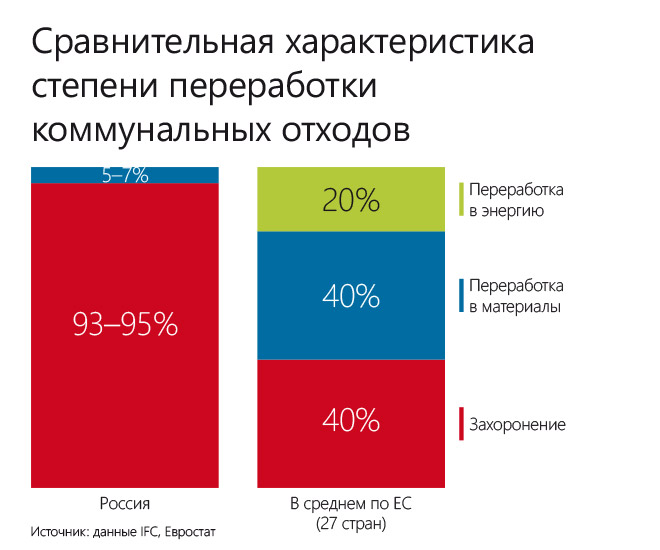 Сравнительная характеристика степени переработки коммунальных отходов в России и ЕС